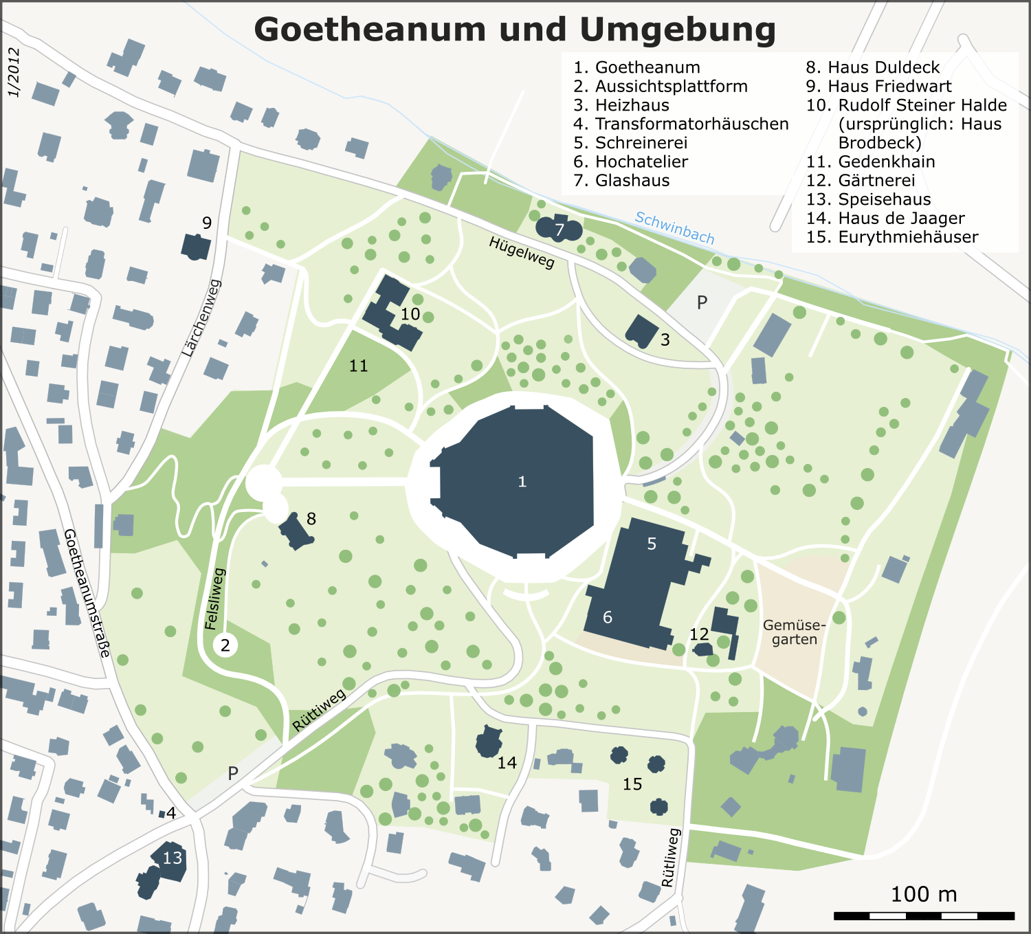 Karte des Goethenaum: Gebäude + Park This map may be incomplete, and may contain errors. Don't rely solely on it for navigation.